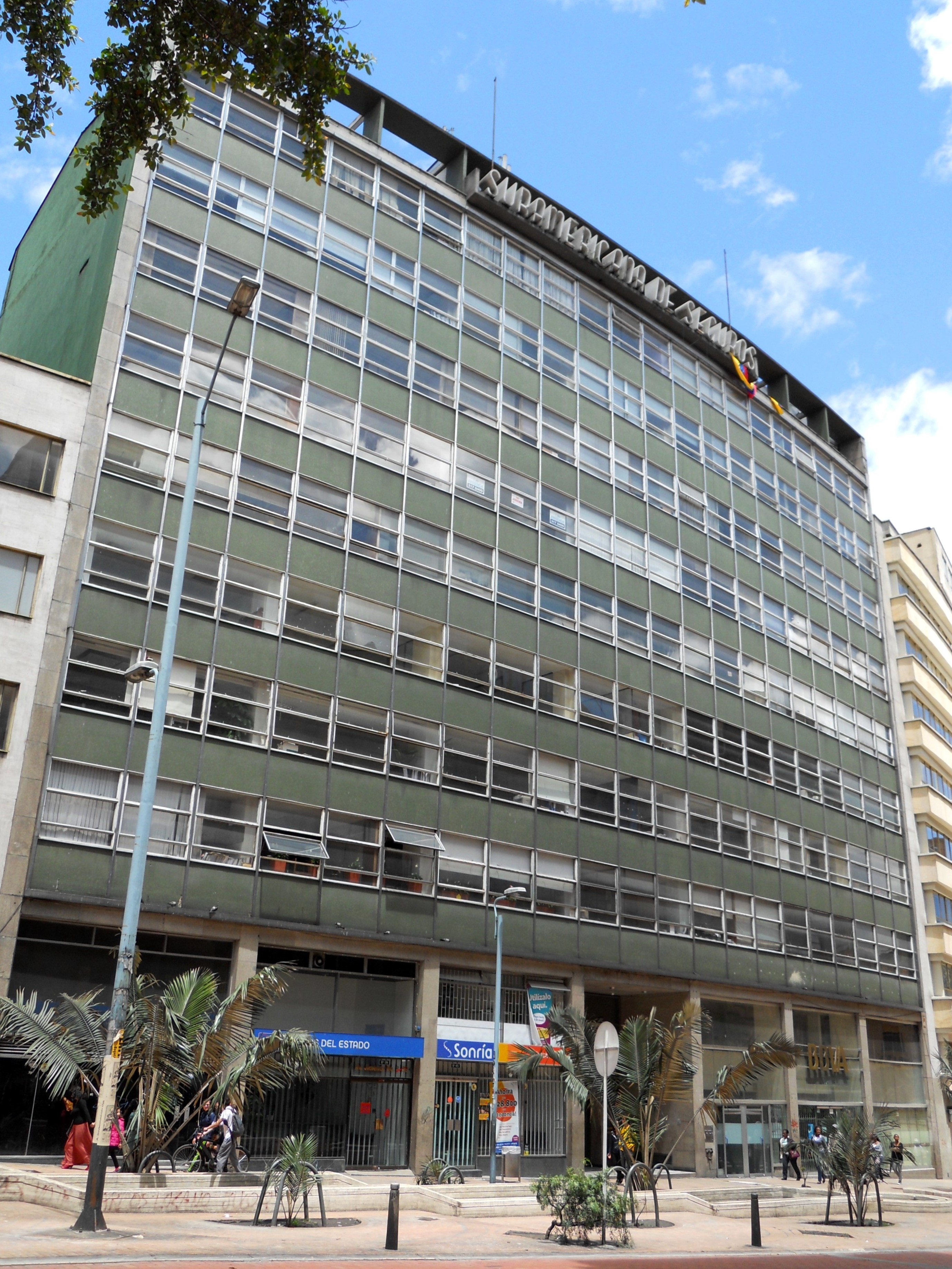 Edificio Suramericana de Seguros en el Eje Ambiental con carrera Octava. Bogotá.